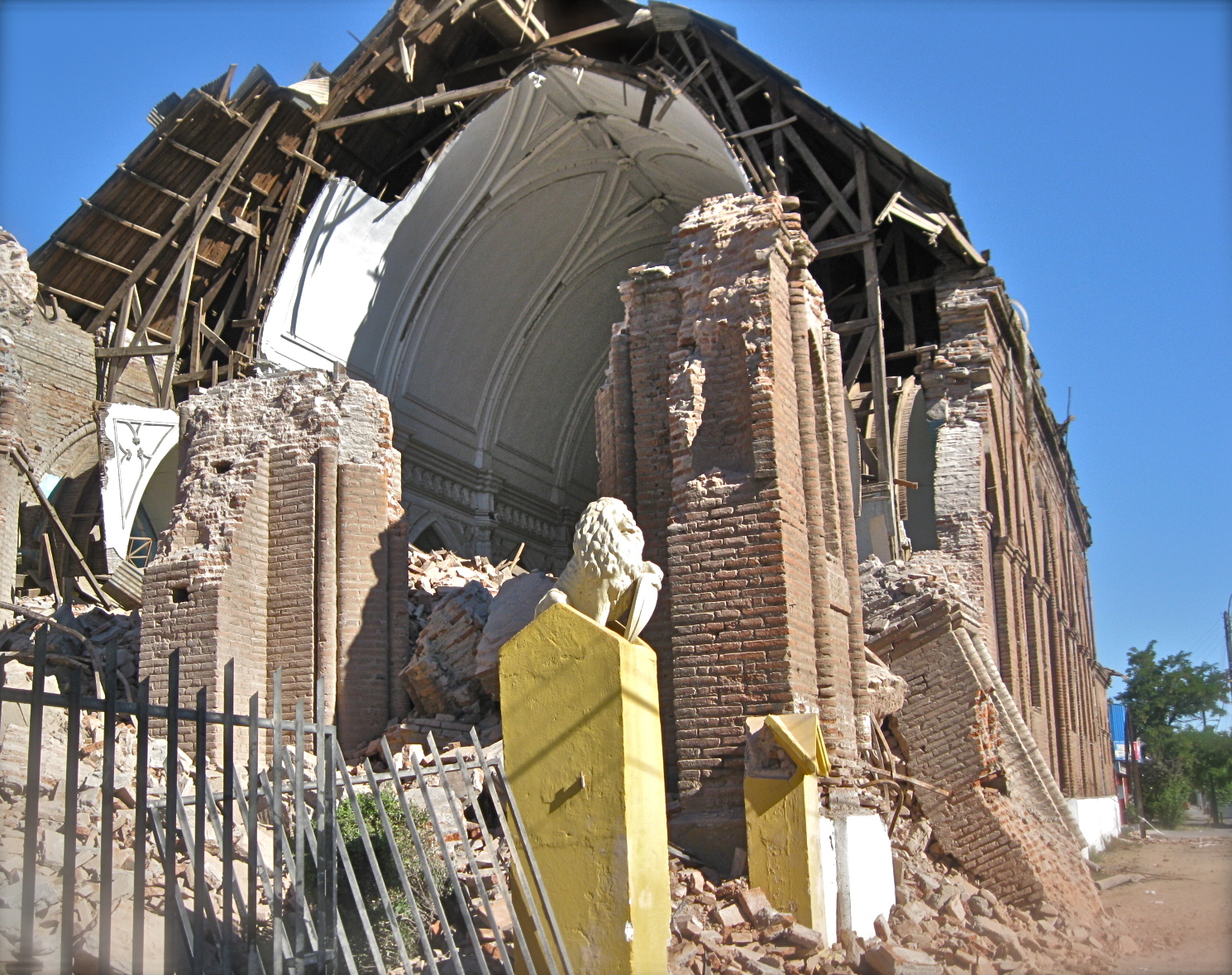 Iglesia San Francisco (Curicó, Región del Maule, Chile) siete días después del terremoto de Cauquenes (grado 8.8 en la escala de magnitud de momento) del 27 de febrero de 2010 (Foto: José Luis Giordano; 6 de marzo de 2010). This is a photo of a national monument in Chile: 381